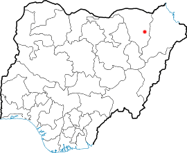 Localização de Damaturu na Nigéria.